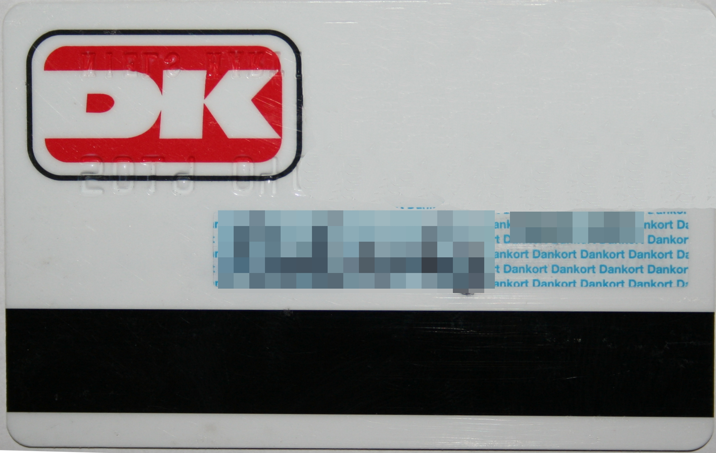 Billede af dankort fra Lån & Spar Bank (bagside)